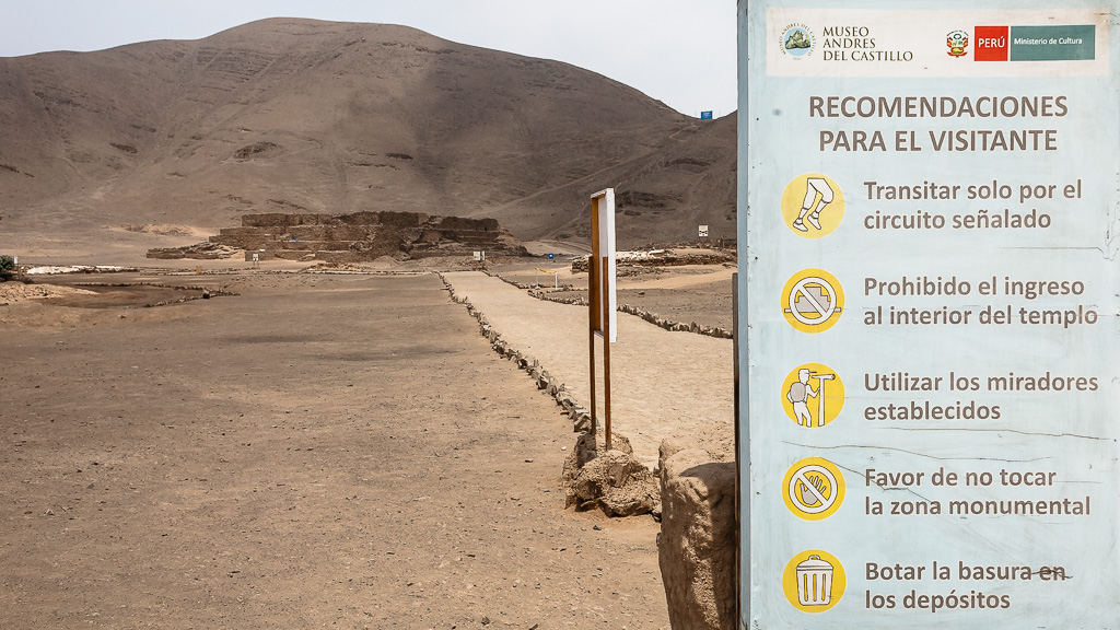 Cartel de recomendaciones al visitante